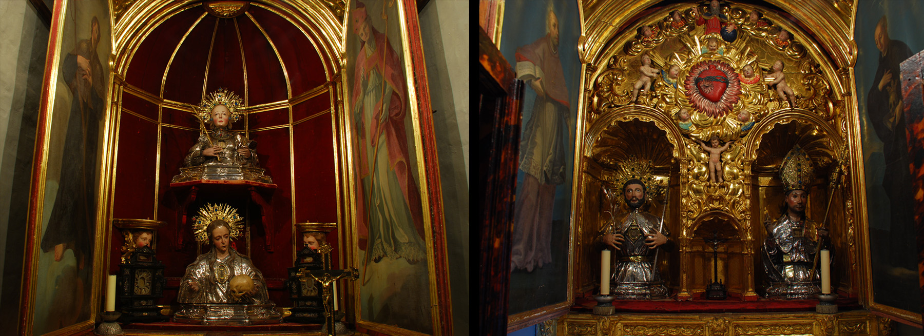 Capillas laterales de la sacristía mayor de la catedral de Pamplona